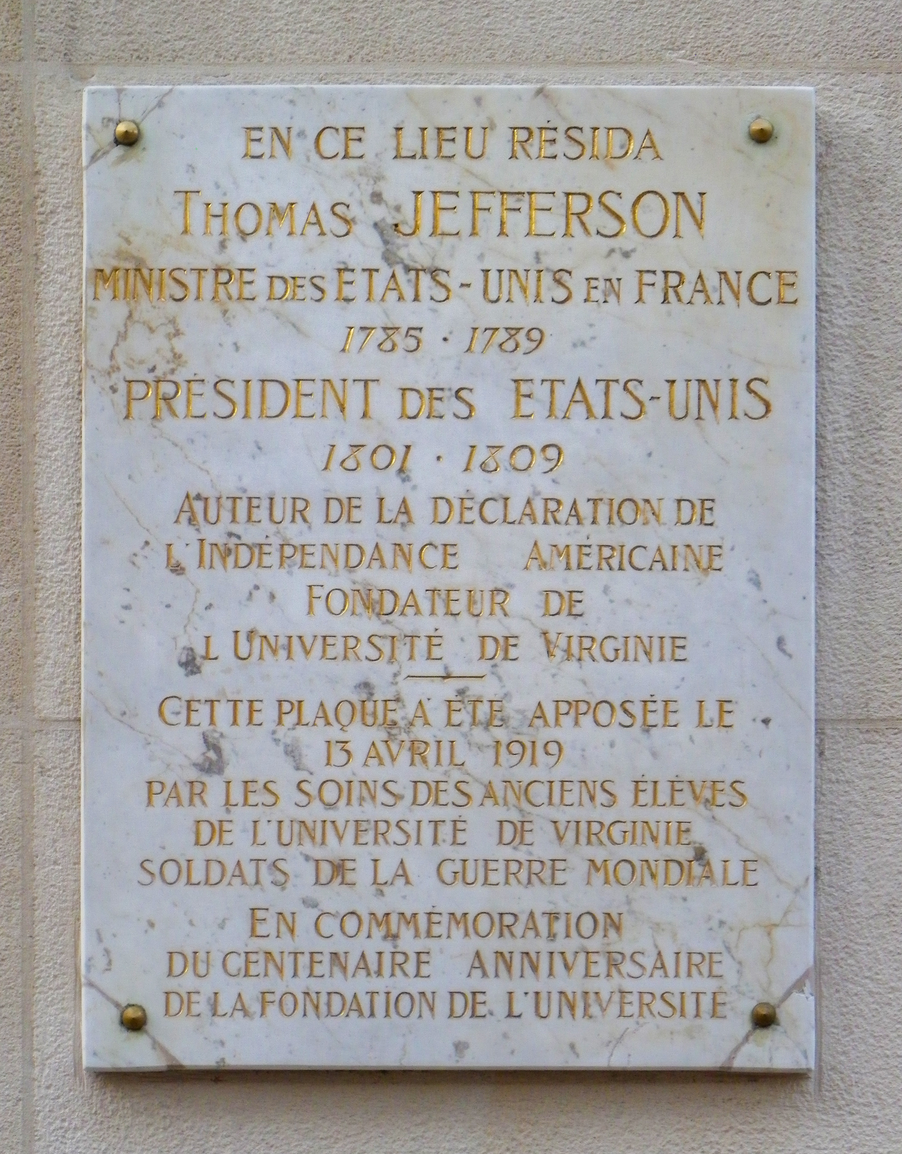 Plaque Thomas Jefferson au 92 avenue des Champs-Elysées à Paris